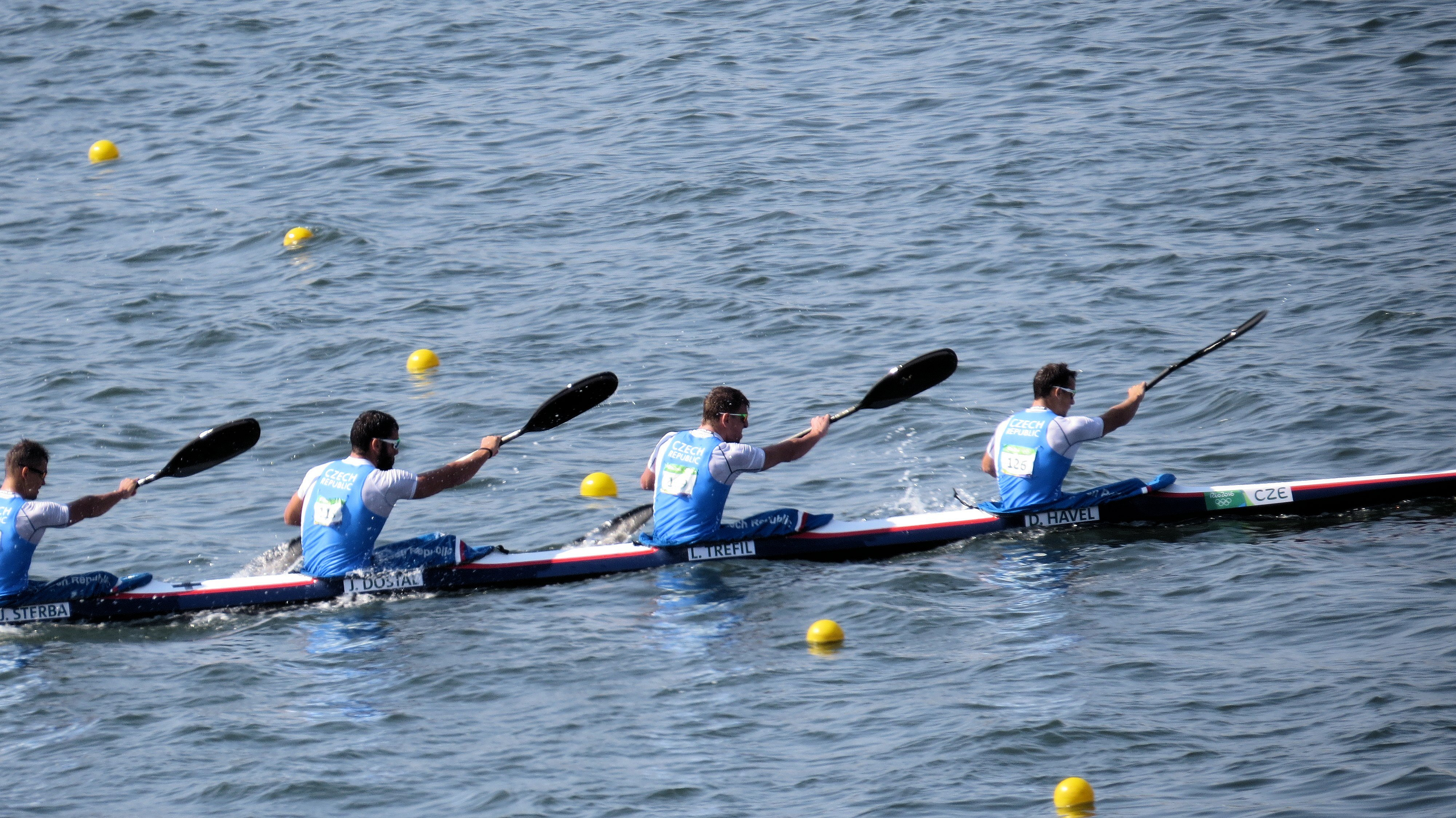 Sx50